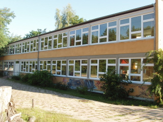 Die 1969 erbaute Schule von Bergholz-Rehbrücke, Andersenweg 43, wurde als typischer DDR-Schulbau unter Denkmalschutz gestellt.